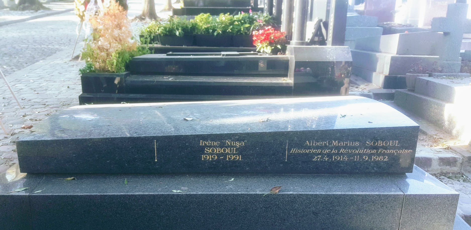 Grab von Albert Soboul in Paris